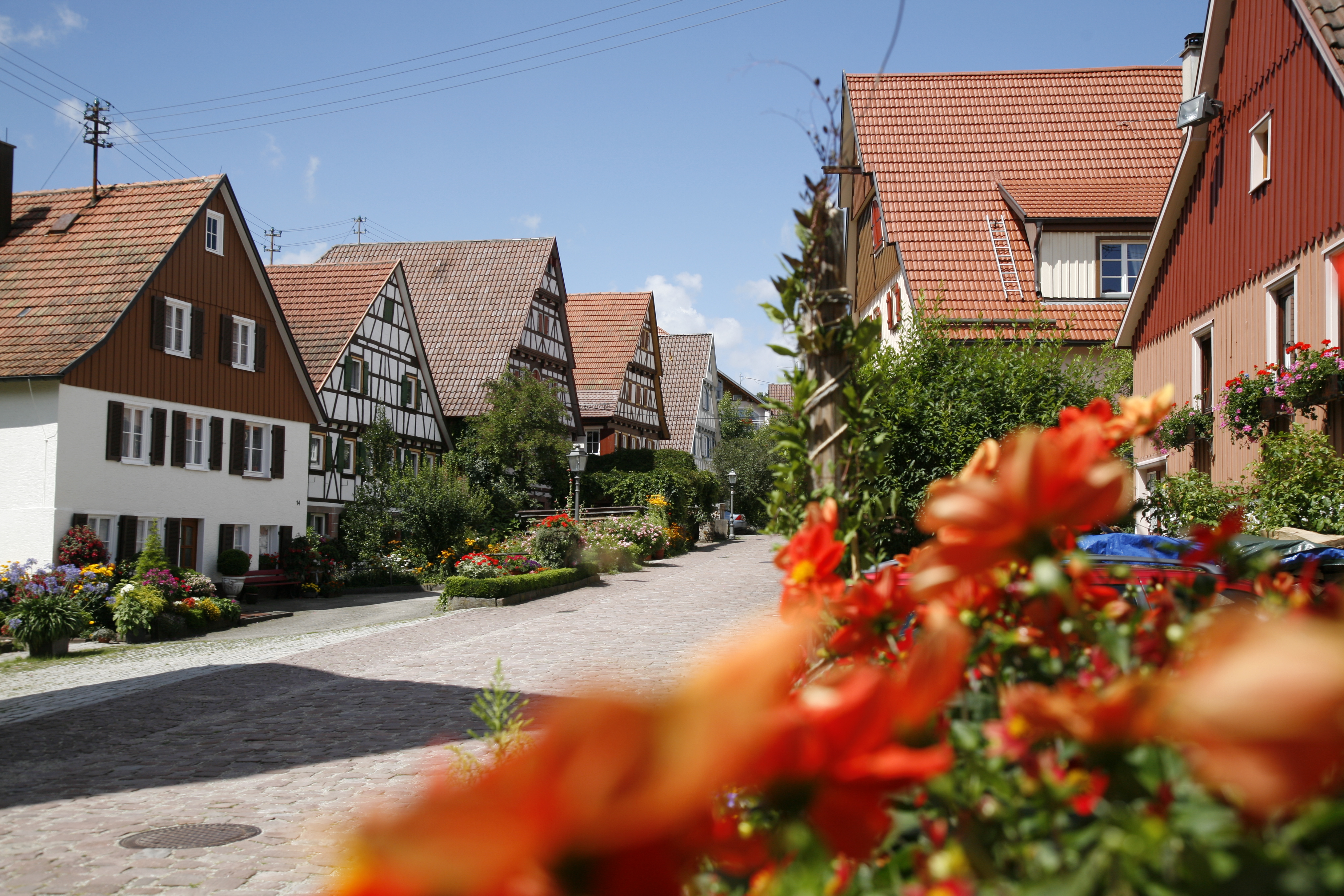 Fachwerkstädtle Zavelstein